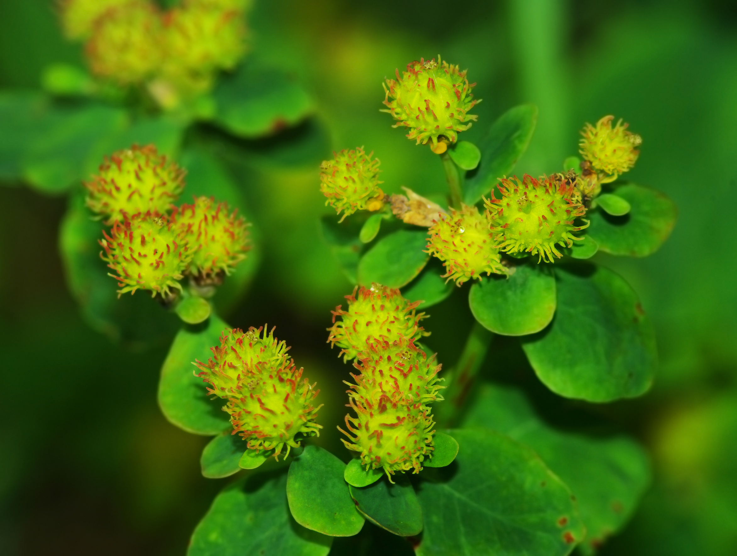 Wilczomlecz pstry, ostromlecz pstry (Euphorbia epithymoides) - Bukowa Góra w Dąbrowie Górniczej